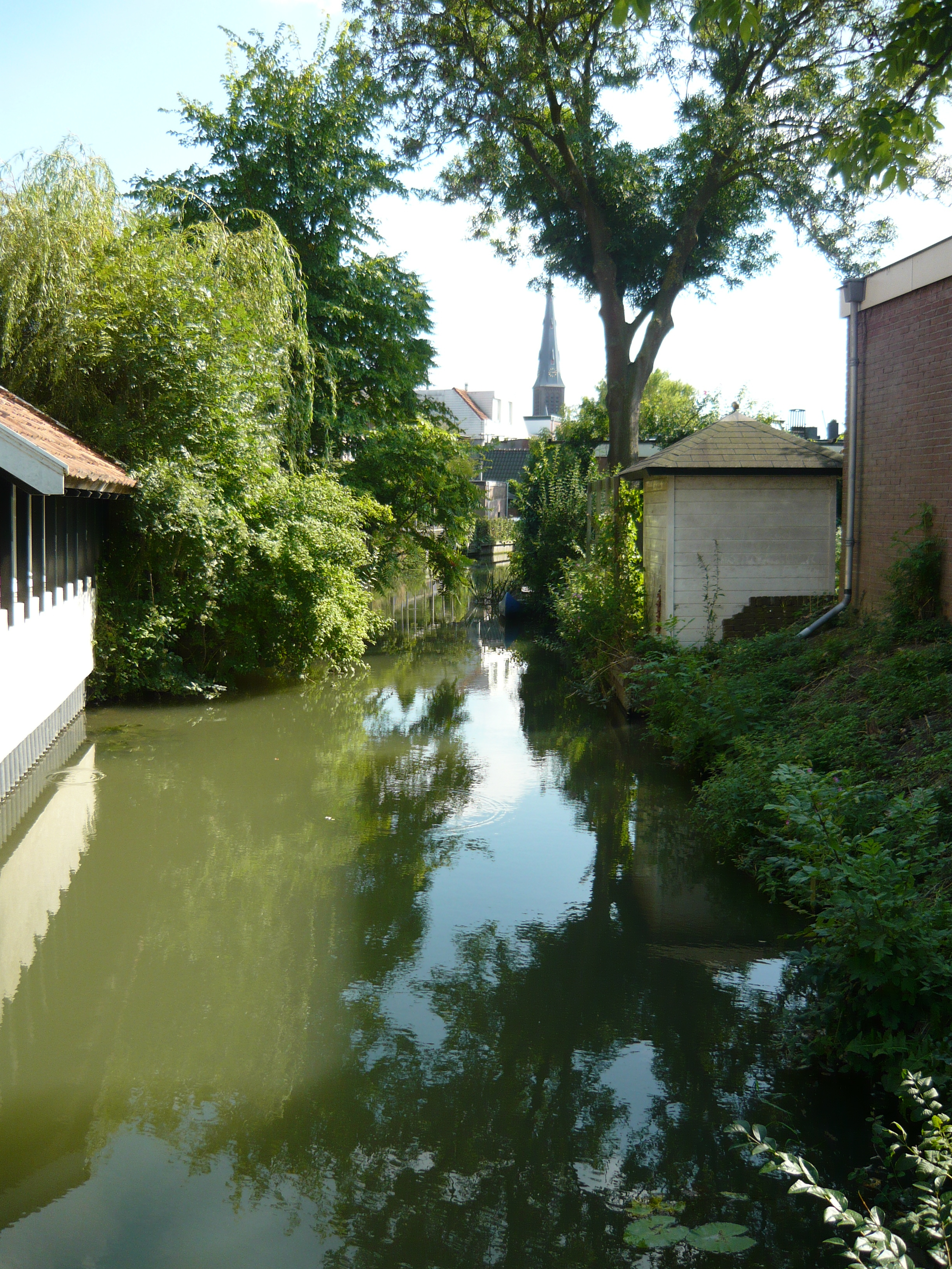 Vleutense Wetering te Vleuten, gezien vanaf de brug in de Odenveltlaan in zuidoostelijke richting. In de achtergrond de torenspits van de Sint-Willibrorduskerk